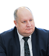 Сергей Викторович Чеботарёв (род. 1969) — российский государственный деятель